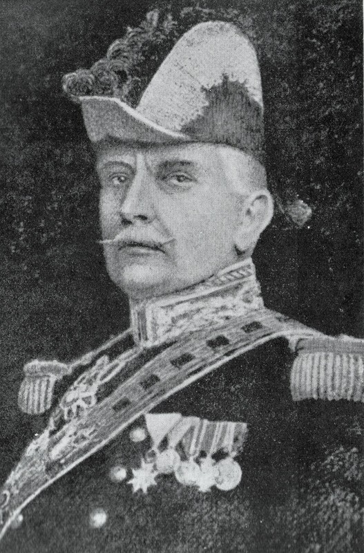 Il Conte Mario di Carpegna (1856–1924) è stato un politico italiano, fondatore — il 16 gennaio 1916 — dell’Associazione Scouts Cattolici Italiani (ASCI). Fu guardia nobile del papa ed esponente di primo piano del movimento cattolico romano.